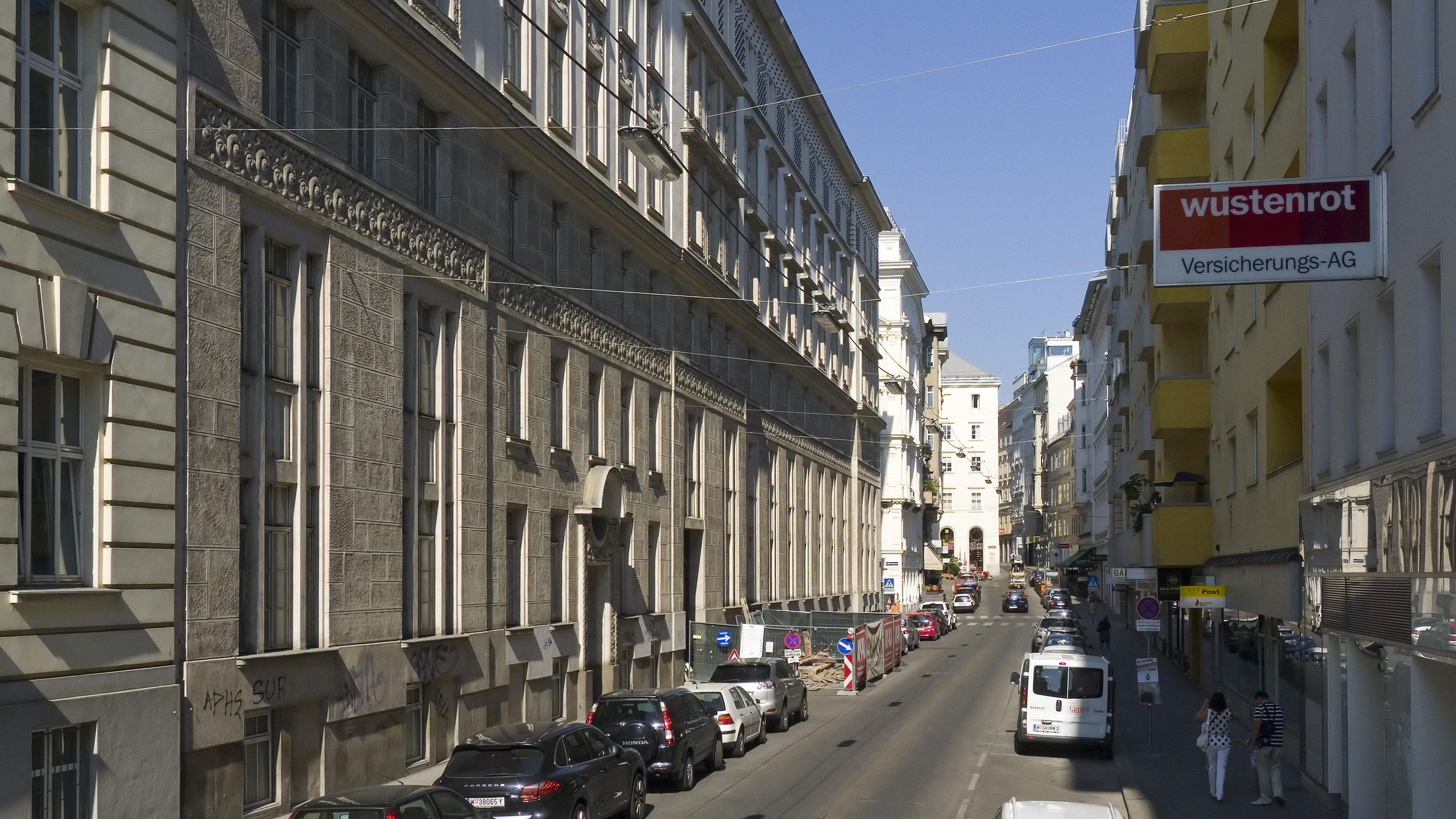 Zedlitzgasse in Wien 1 bei Nr. 7 Richtung Nordwesten